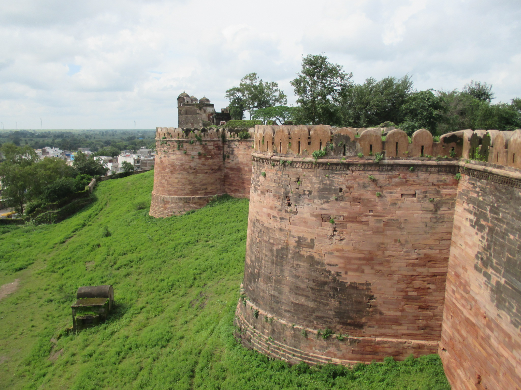 Dhar Fort, Dhar, Madhya Pradesh